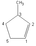 imagem de um cicloalceno